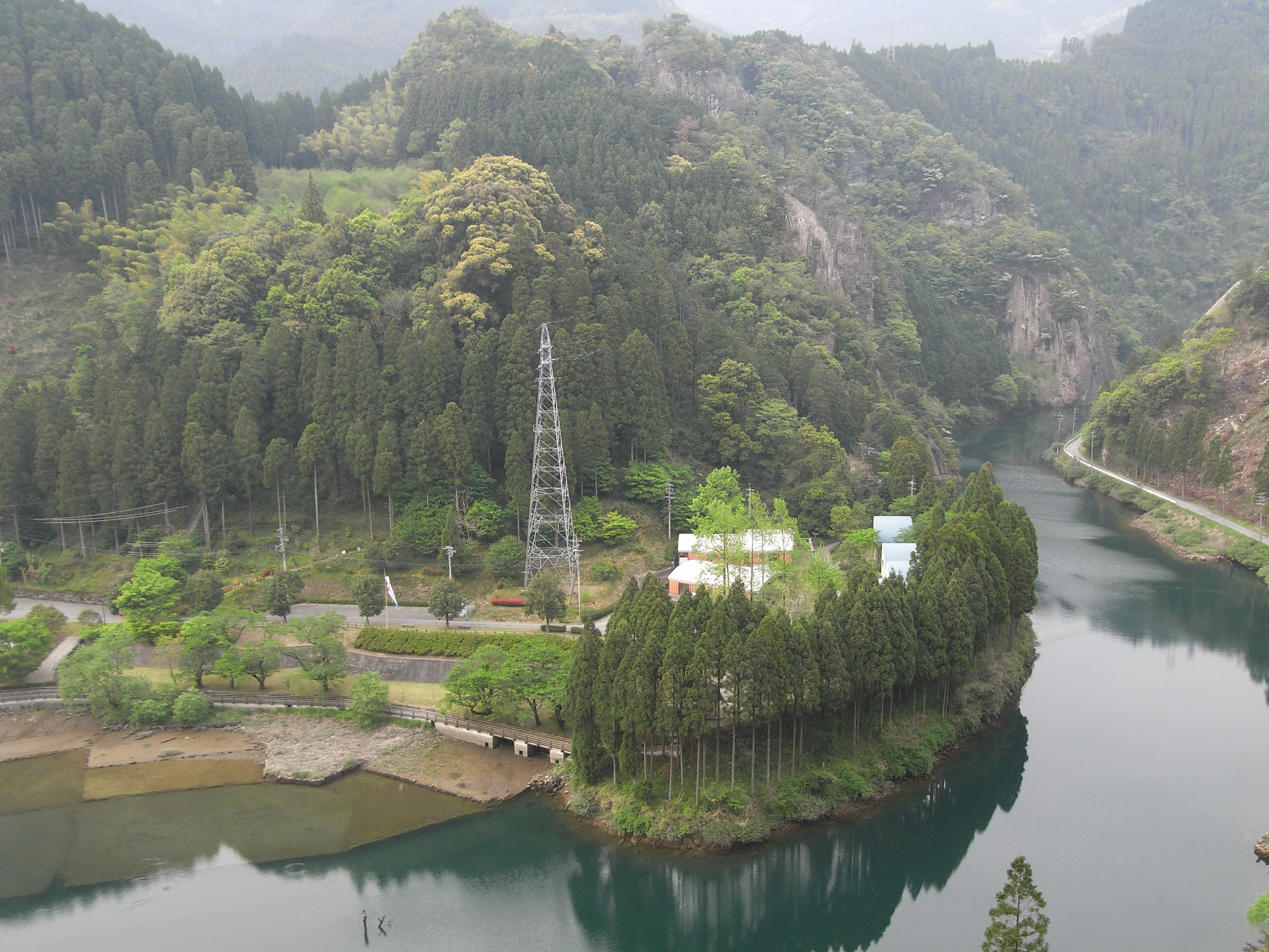 Lake